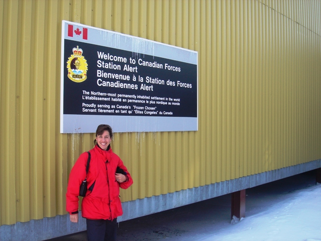 CG Lochman at Alert